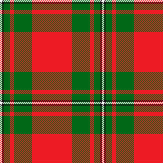 W/4 K4 G12 R8 G36 R/80